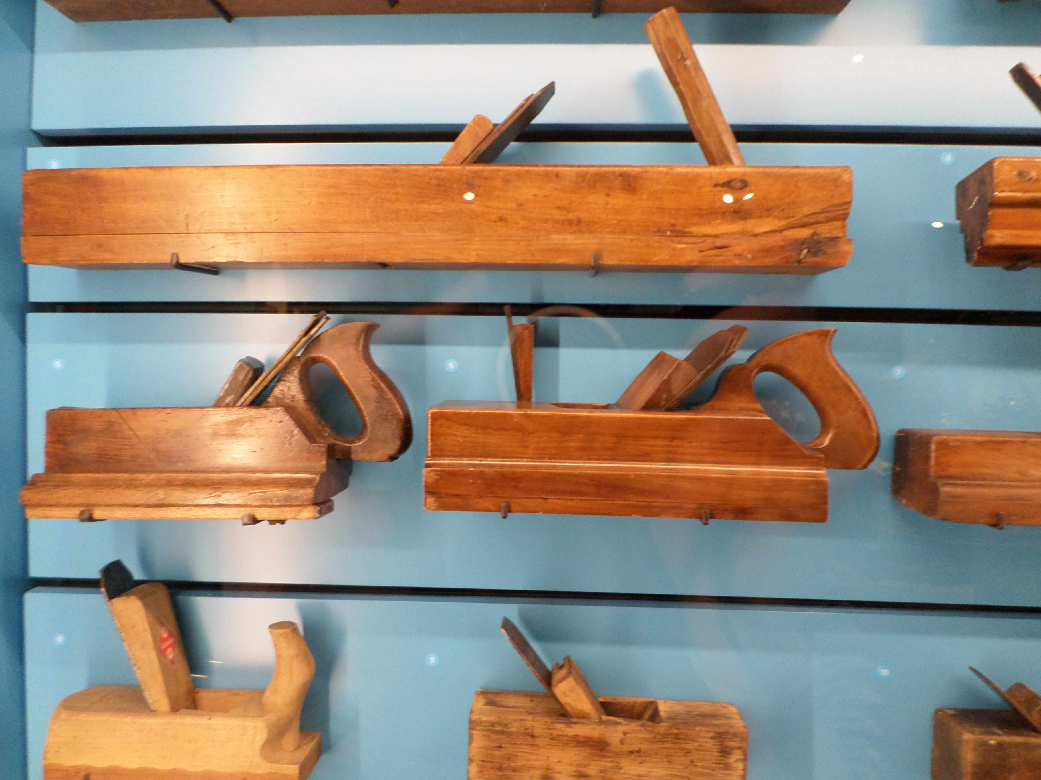 rabot